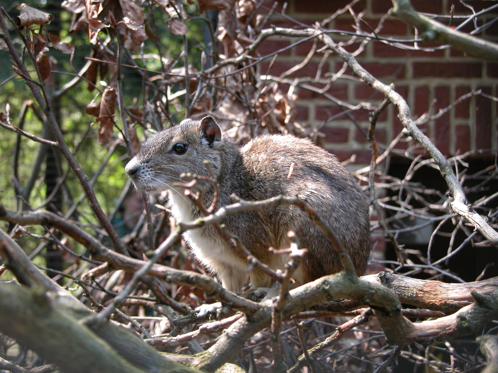 Berg- oder Felsenmeerschweinchen (Kerodon rupestris) Vorkommen ausschließlich in Brasilien